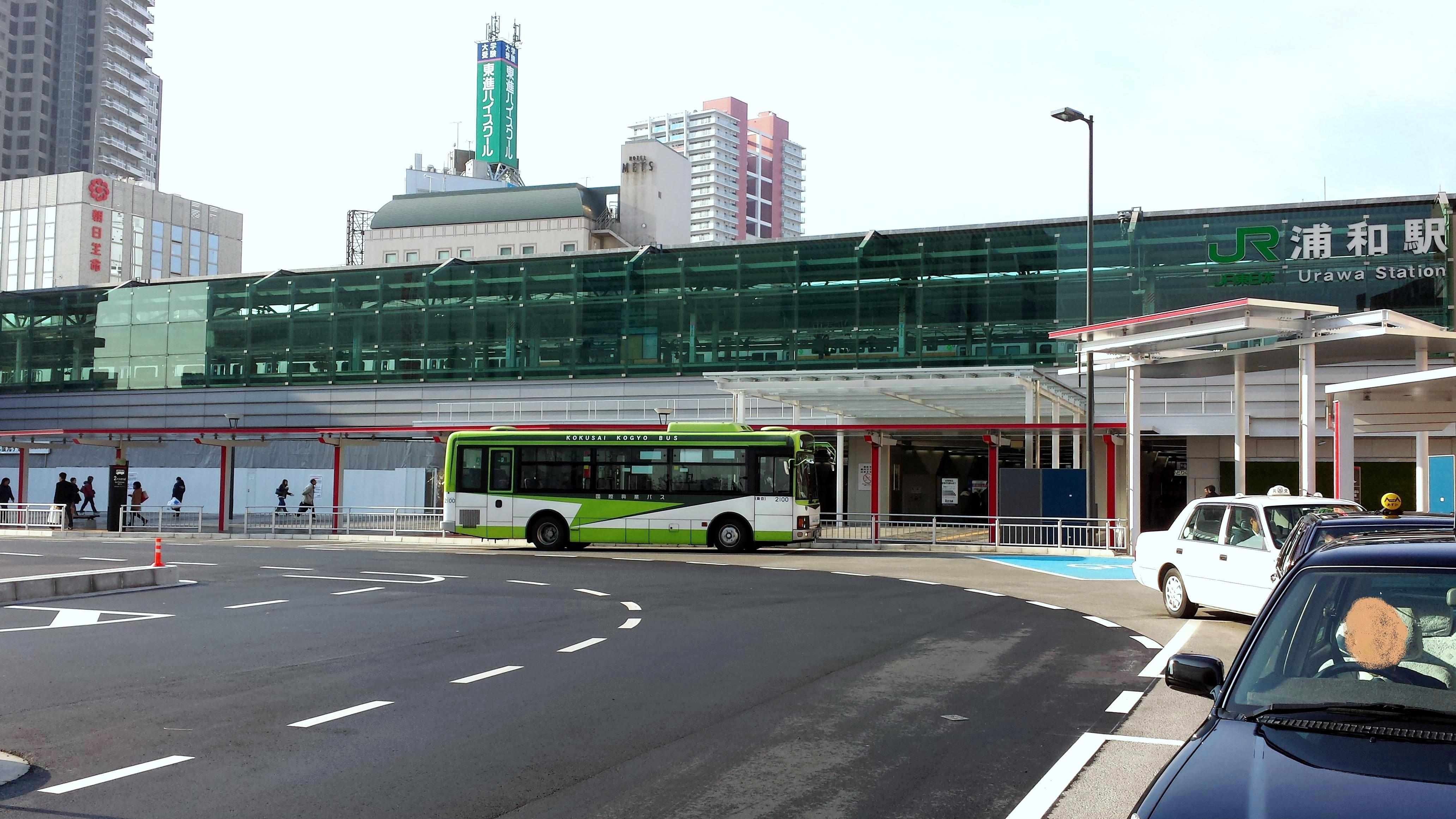 浦和駅東口、2014年12月